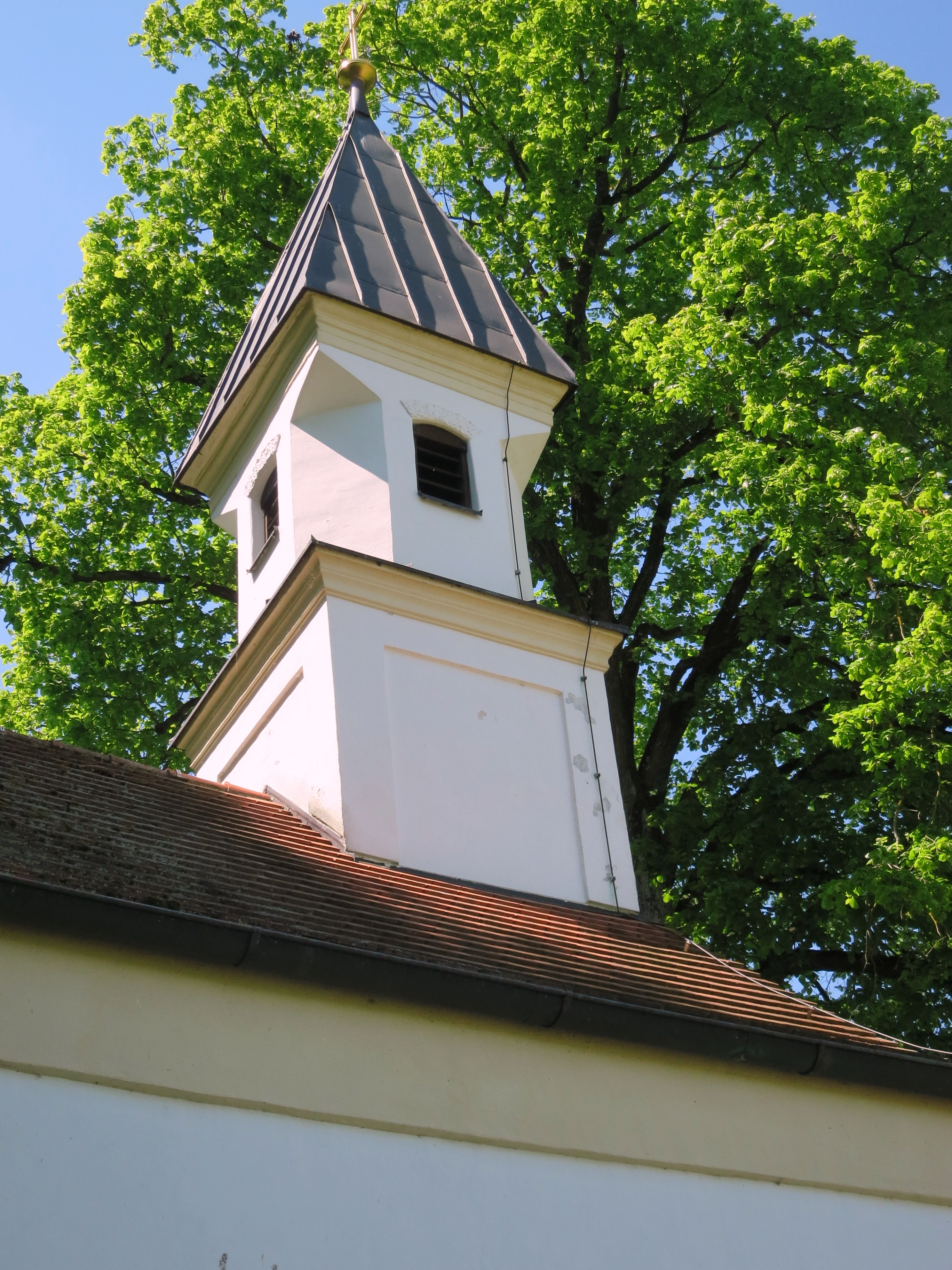 Eine kleine Wallfahrtskirche unterhalb von Baumgarten